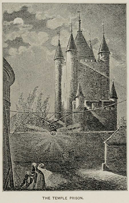 La prison du temple